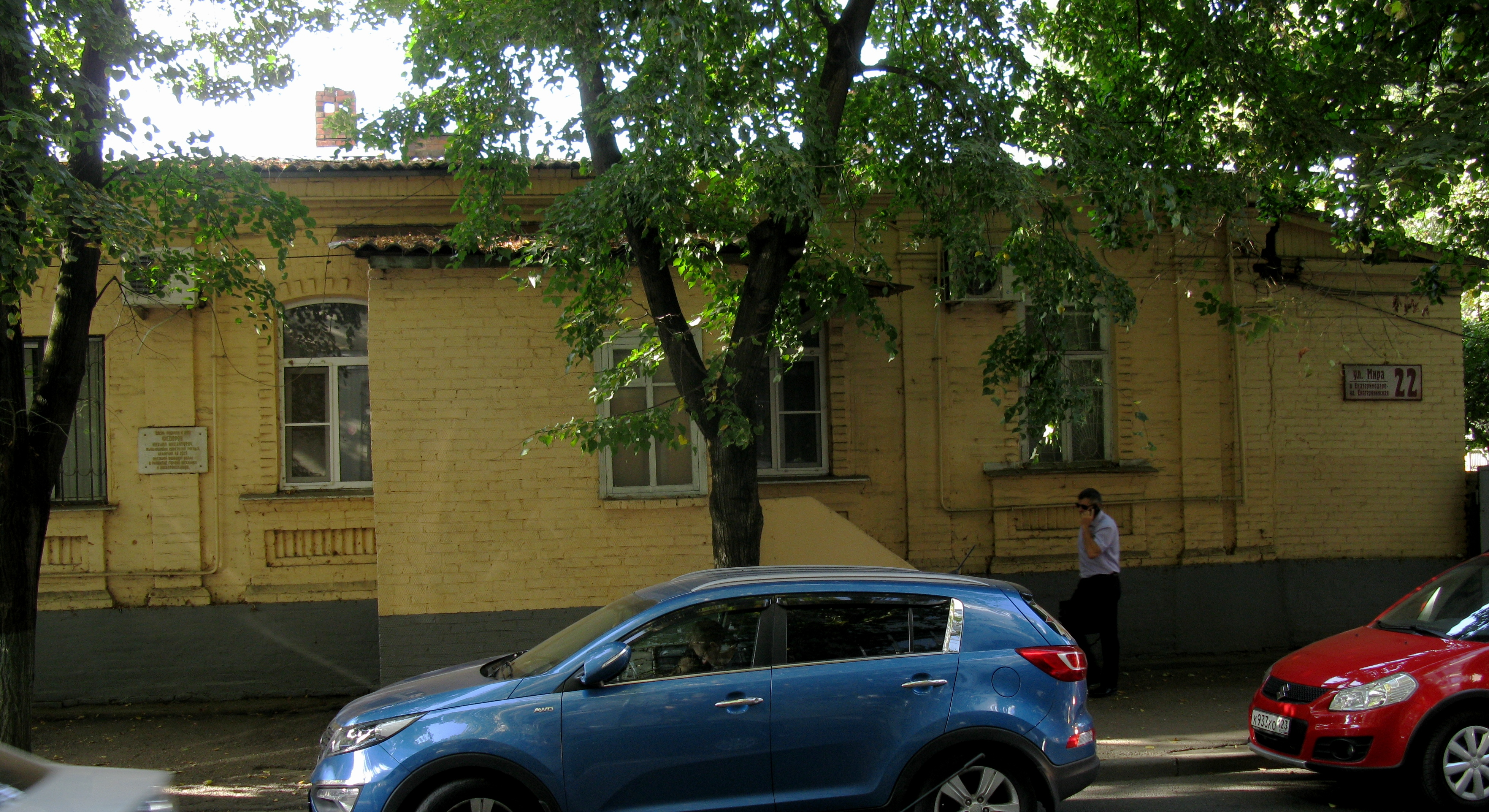 Дом, в котором жил и работал ученый в области горной механики и электромеханики академик АН УССР М.М. Федоров: улица Мира, 22, Краснодар, Краснодарский край